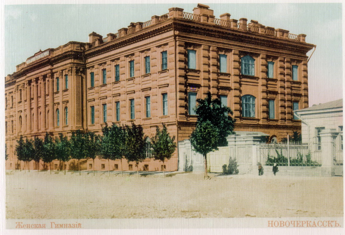 Женская гимназия на дореволюционной открытке